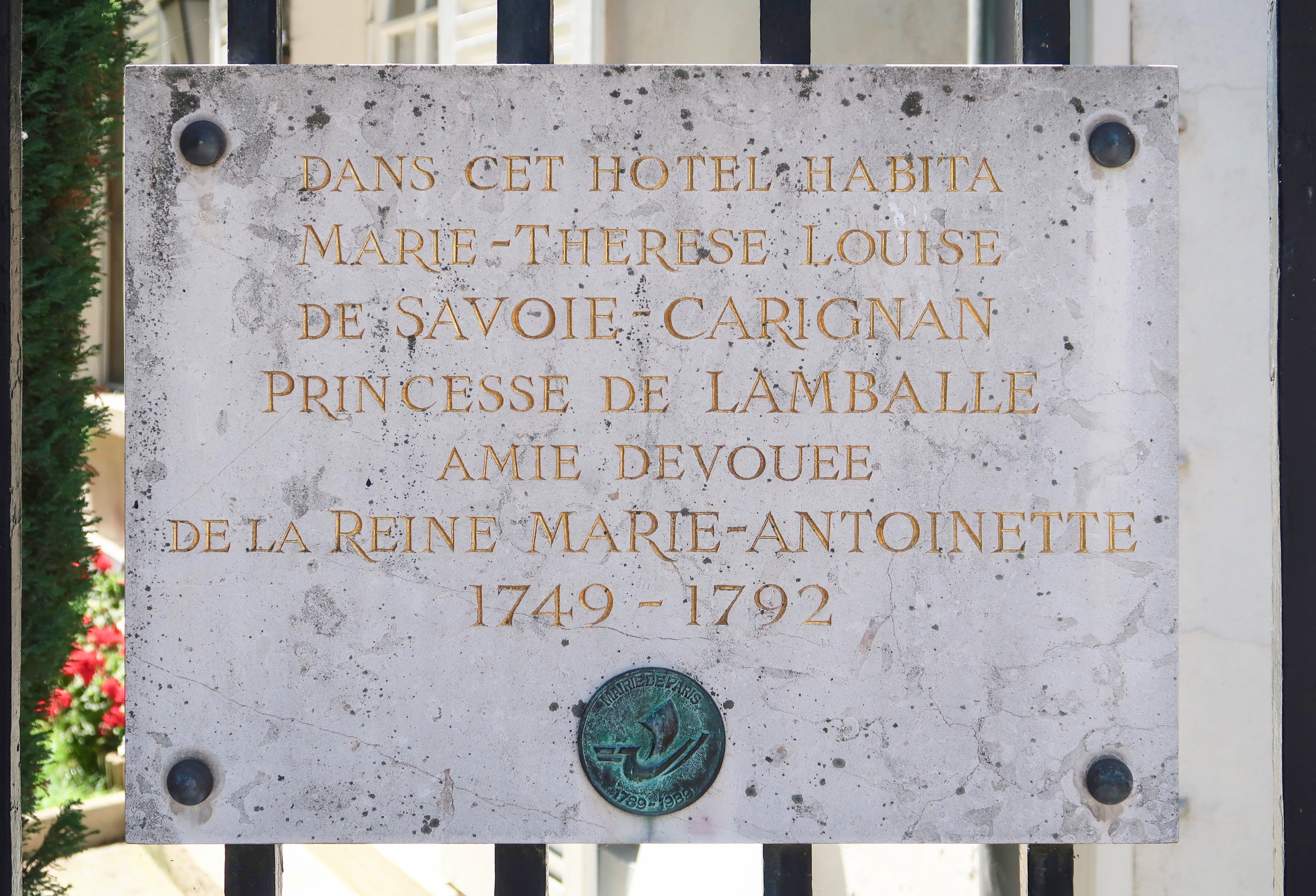 Plaque en hommage à Madame de Lamballe, devant l'entrée de l'hôtel de Lamballe (ambassade de Turquie), 17 rue d'Ankara (Paris, 16e).